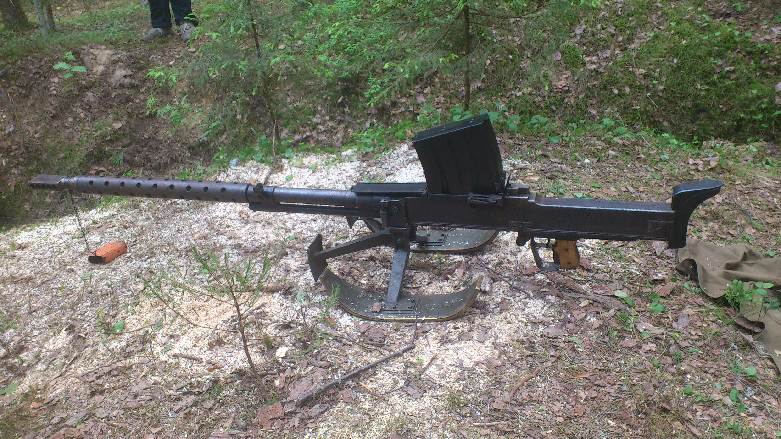 Финское противотанковое ружьё Lahti L-39 на месте бывшей финской оборонительной линии ВТ (Карельский вал). Исторический район «Куутерселькя 1944», район посёлка Лебяжье, Выборгский район Ленинградской области. Экспонат Военного музея Карельского перешейка (Выборг).